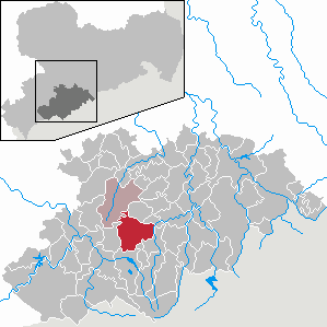 Elterlein im Erzgebirgskreis, Sachsen